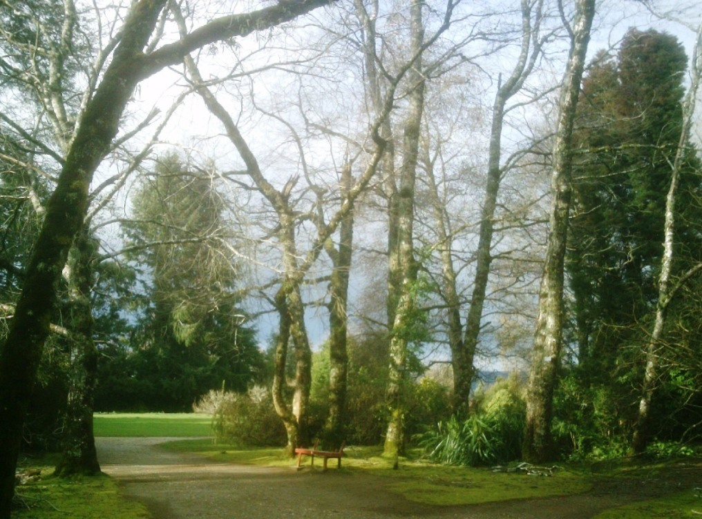 Jardín Botánico en el Campus Teja de la Universidad Austral de Chile, Isla Teja, Valdivia